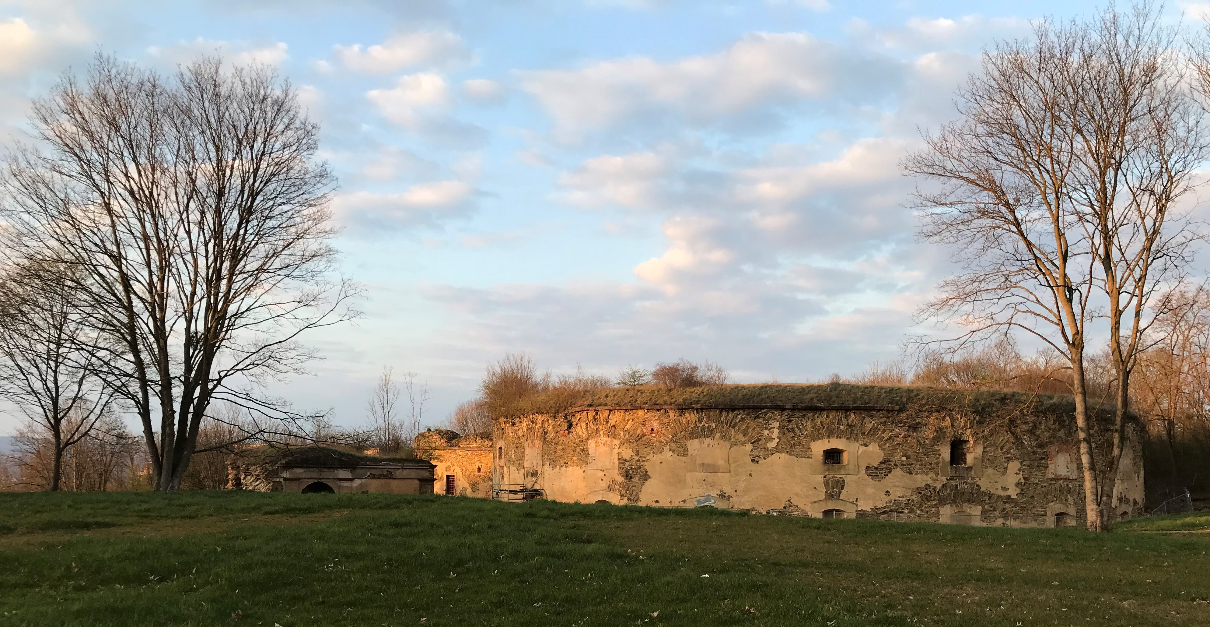 Zu sehen ist das Reduit des Fort Astersteins aus südlicher Richtung sowie links das Tor zur Wallanlage.